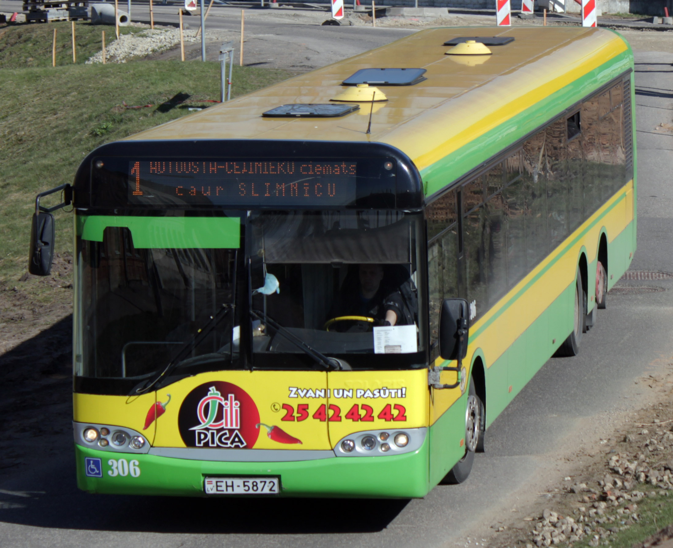 Daugavpils 1. maršruta autobuss